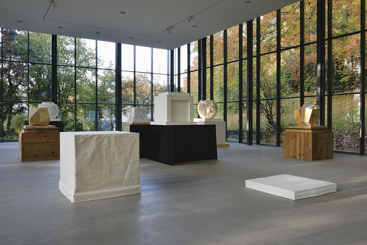 Didier Vermeiren, Skulpturenpark Walfrieden, Wuppertal, 2012